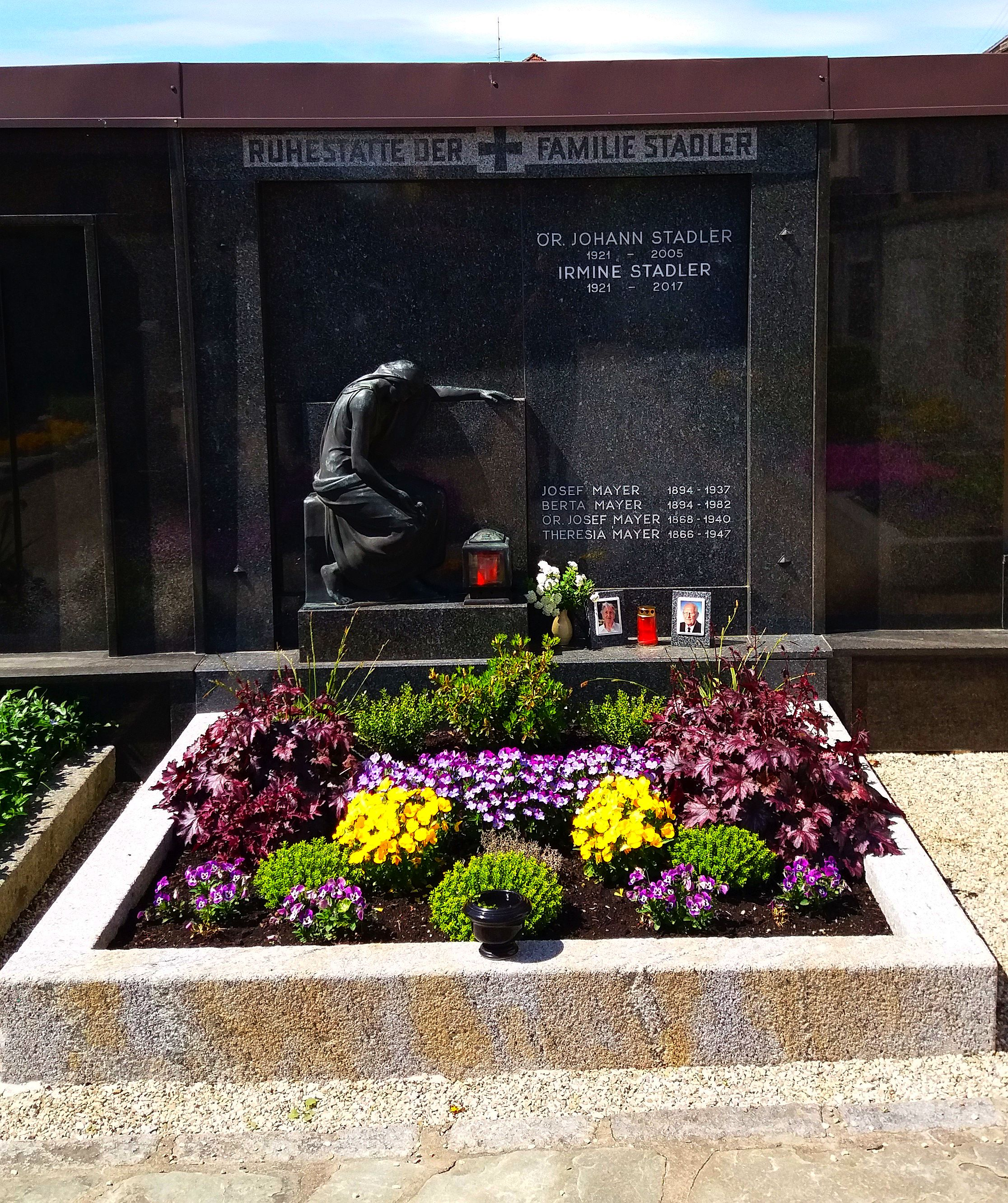 Friedhof Taufkirchen an der Pram - Familiengrab Mayer-Stadler, in dem die Ökonomieräte Josef Mayer (1868-1940) und Johann Stadler (1921-2005) bestattet sind.